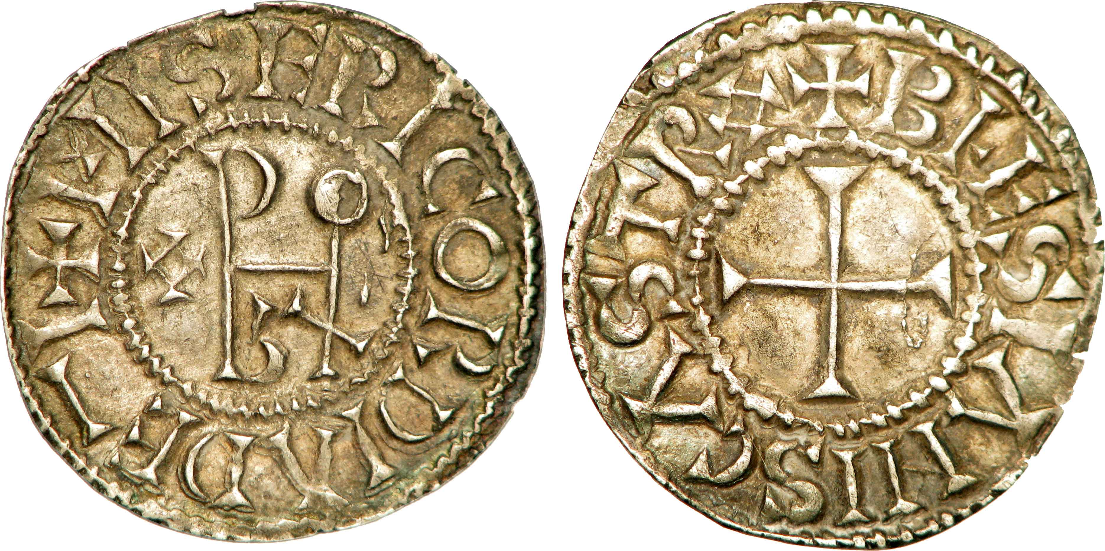 Nom de l'atelier/ville : Blois Métal : argent Diamètre : 19mm Axe des coins : 3h. Poids : 1,67g. Degré de rareté : R1 Titulature avers : + MISERICORDIA DE-I I, (légende commençant à 9 heures). Description avers : Monogramme odonique. Traduction avers : (Miséricorde de Dieu). Titulature revers : + BI-ESIANIS CASTRO, (O losangé). Description revers : Croix. Traduction revers : (Château de Blois).